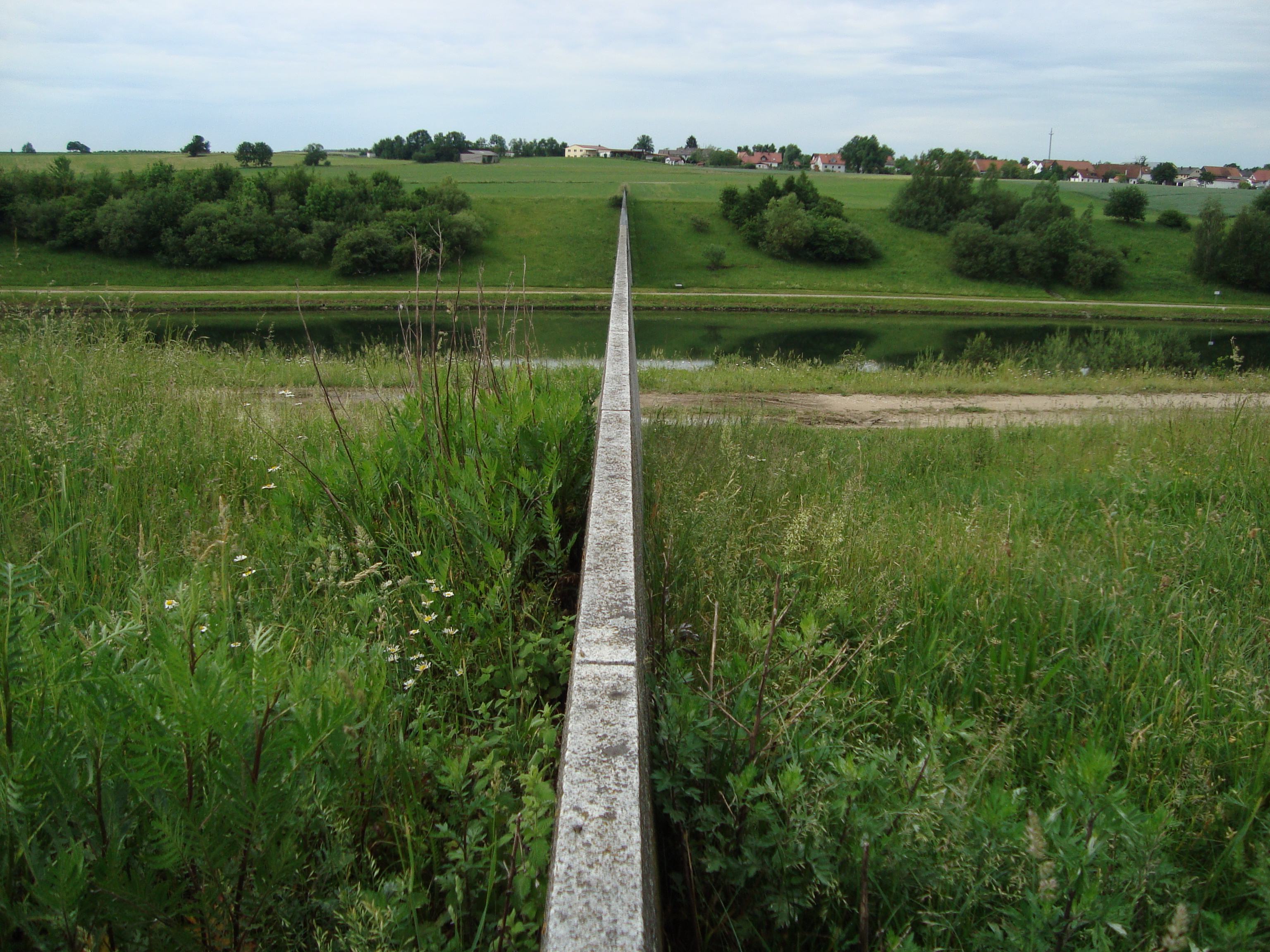 Skulptur Scheitelhaltung von Hanssjörg Voth